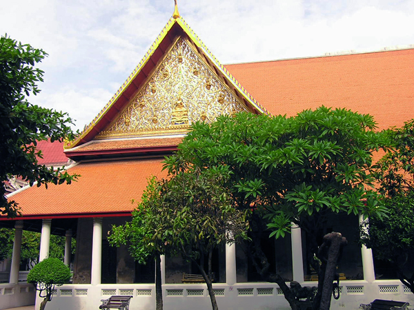 พระที่นั่งอุตราภิมุข ภายในพระราชวังบวรสถานมงคลหรือพิพิธภัณฑสถานแห่งชาติ พระนครในปัจจุบัน